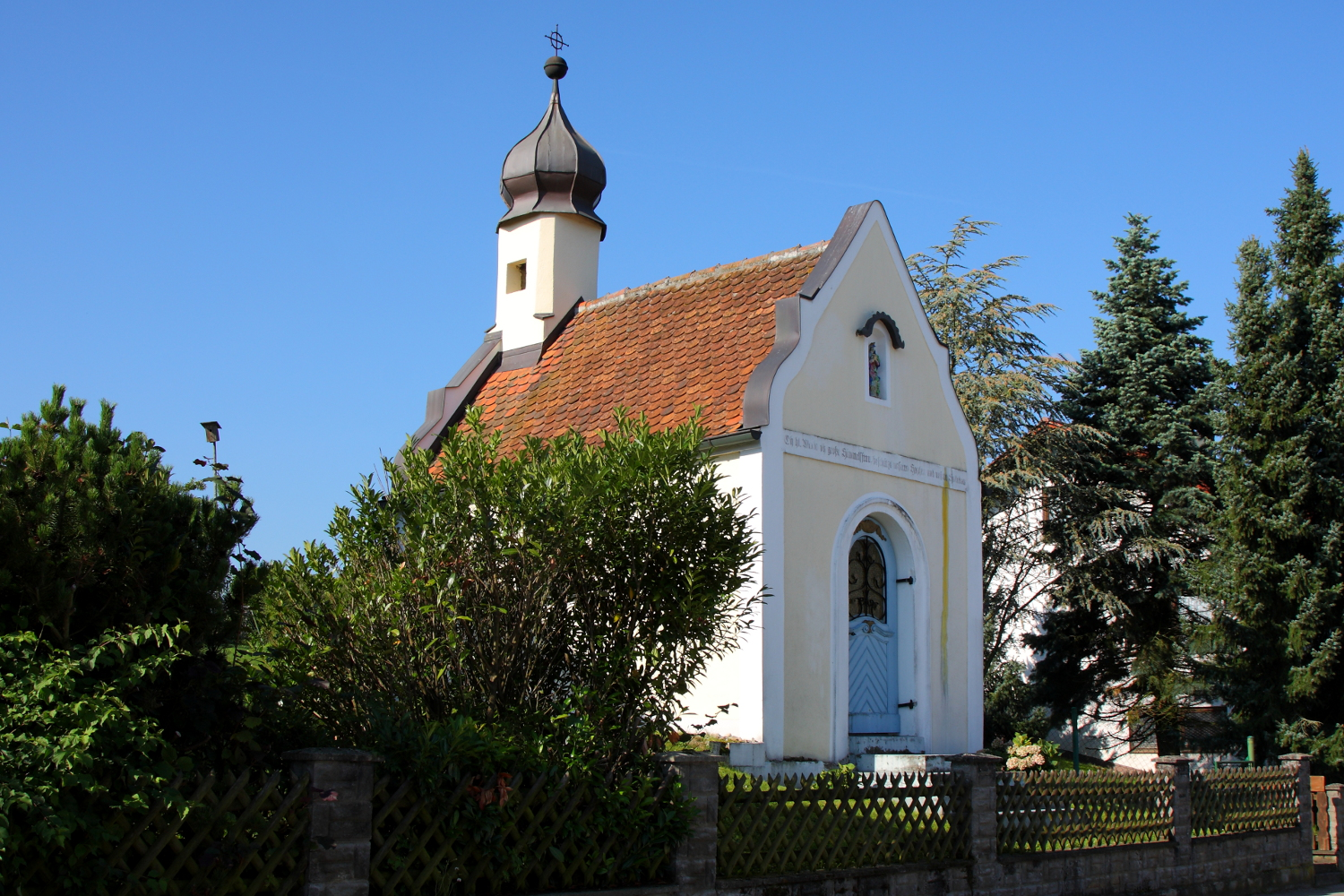 Anfang 20. Jh., neubarock; mit AusstattungThis is a photograph of an architectural monument.